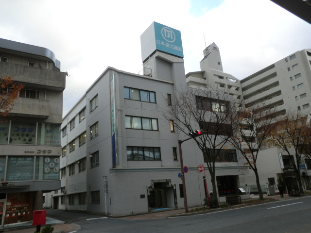 北九州市の日本磁力選鉱の本社です。